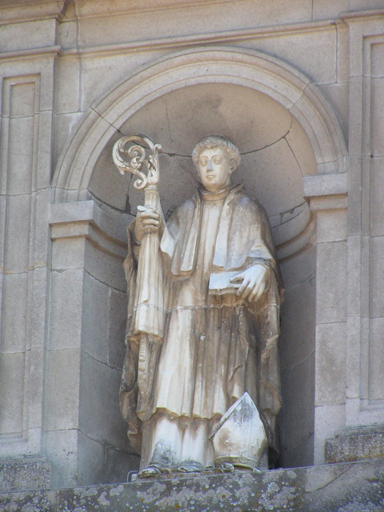 Sé de Viseu, estátuas na fachada